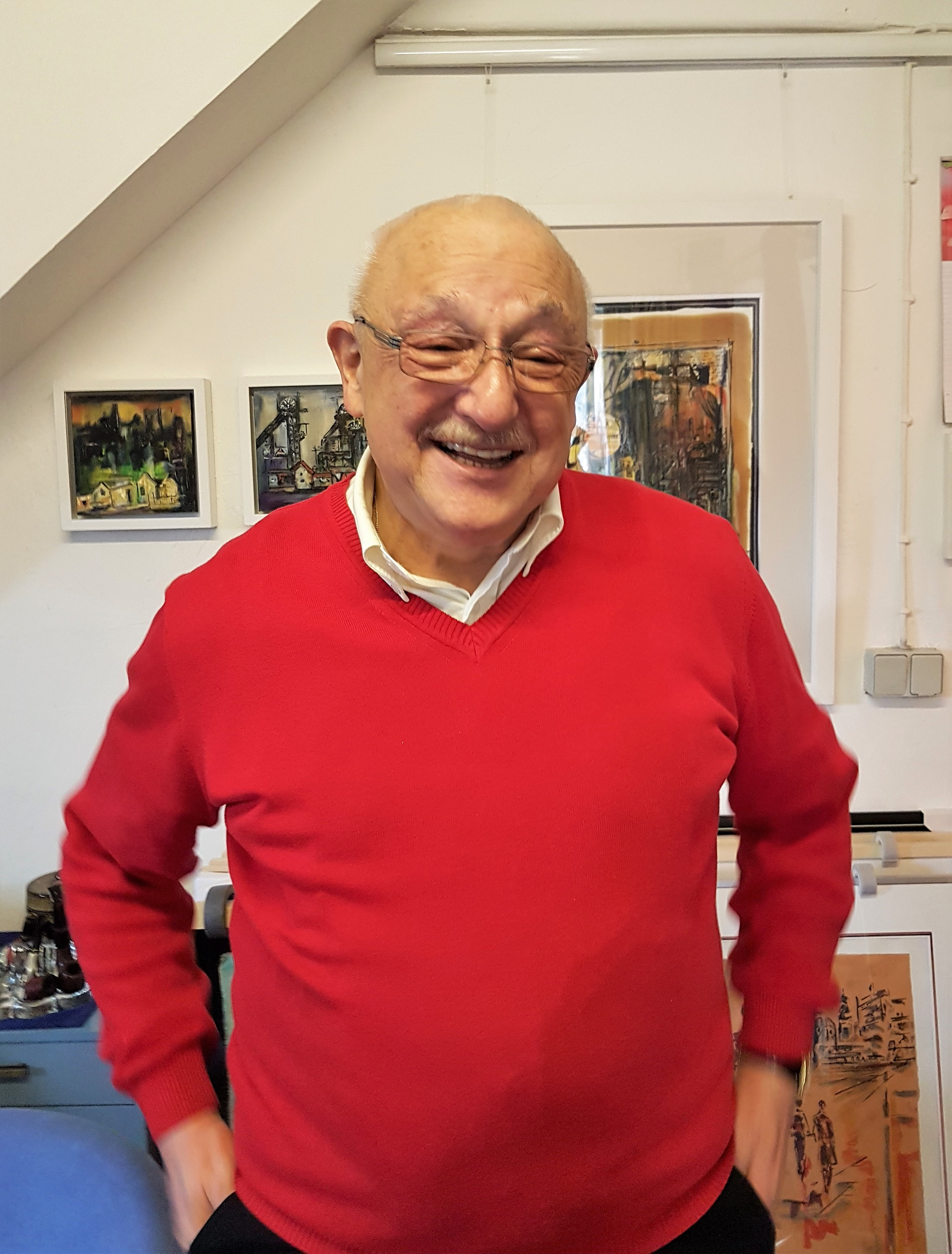 Horst Reinsdorf in seinem Atelier in Luisenthal (Saar)